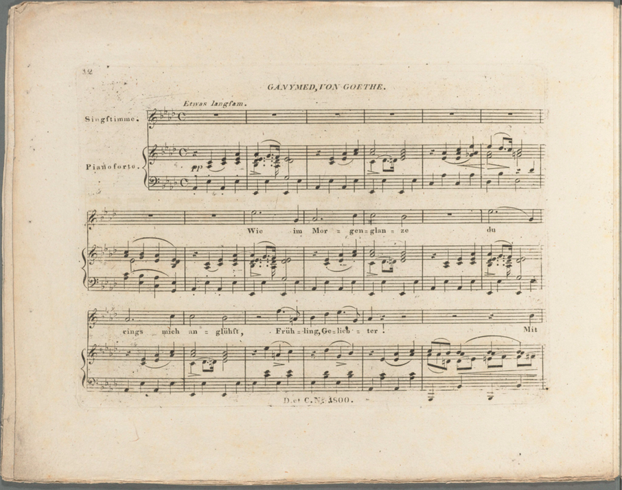 Édition de Diabelli, 1825